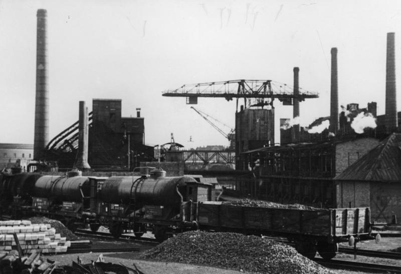 Berlin, Gasanstalt, Kohleanlieferung Gasanstalt Berlin-Greifswalderstraße. Laufend treffen Güterzüge mit neuer Steinkohle für die Produktion von Gas ein. Aufn.: Illus-Schaaf 2003-48